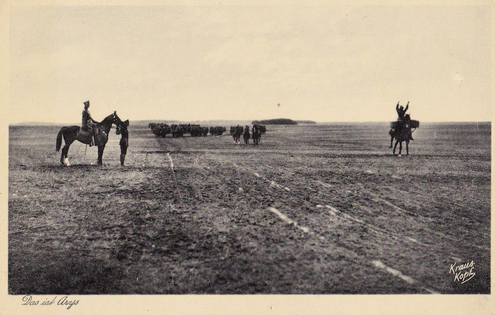 Das ist Arys